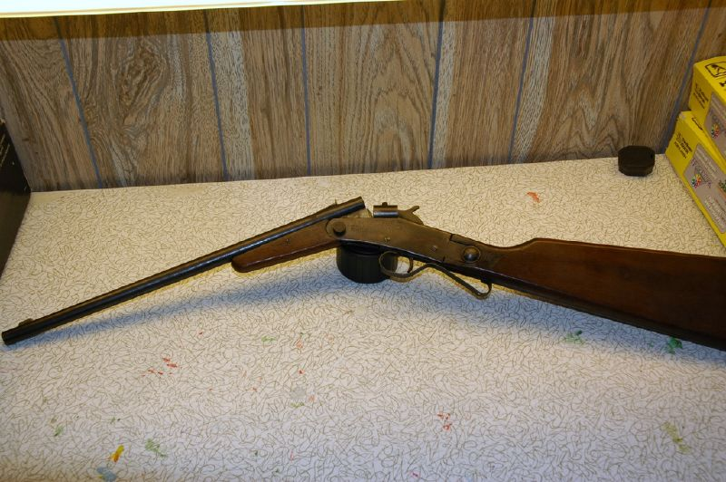 Hamilton Model 27 .22 carbine